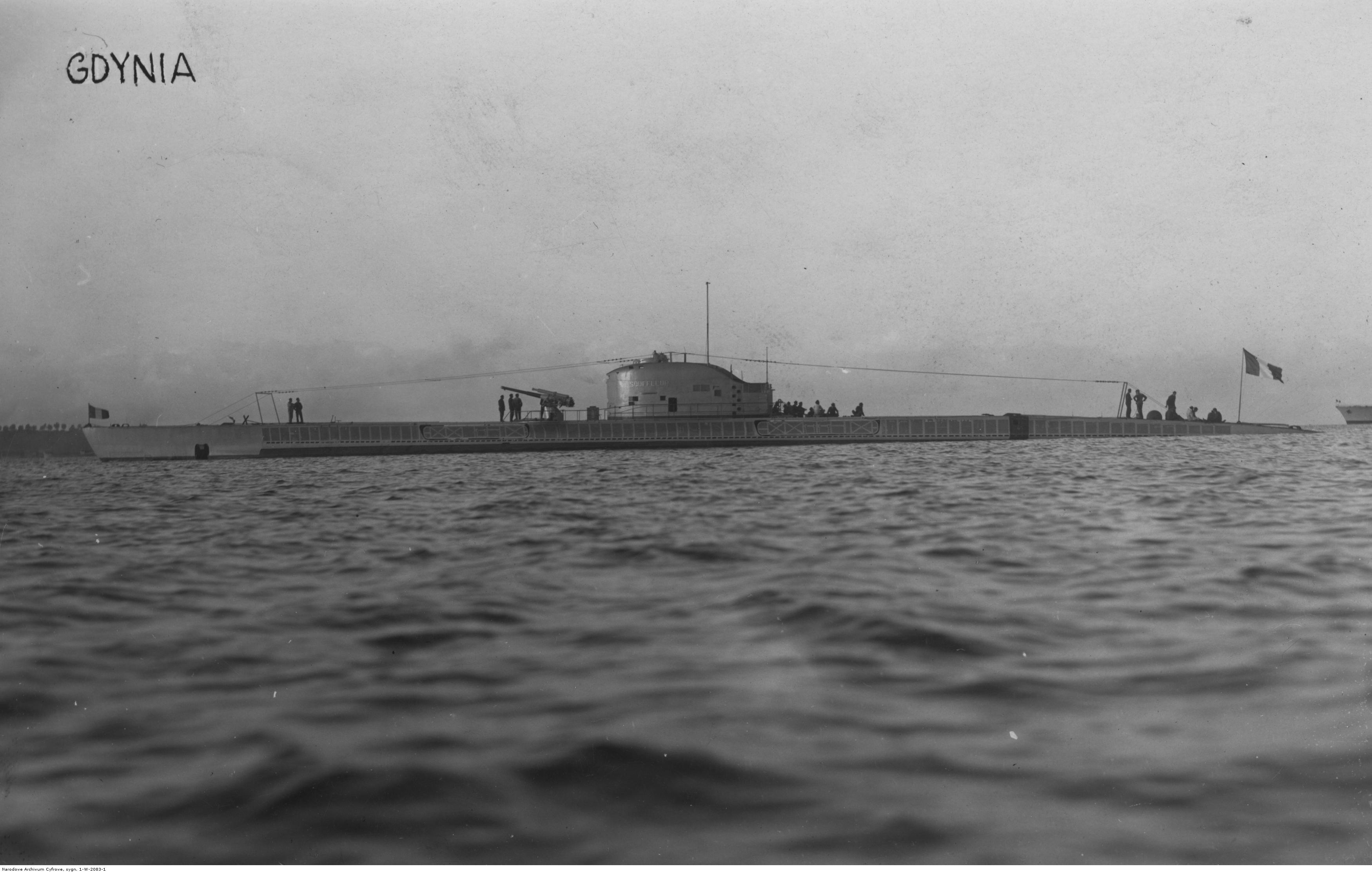 Francuski okręt podwodny "Souffleur" wpływa do portu w Gdyni.